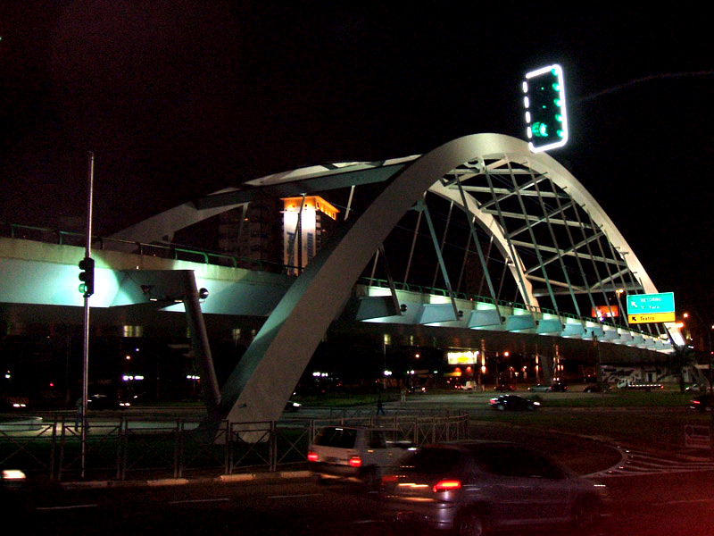 Viaduto Reinaldo de Oliveira, em Osasco, SP, Brasil